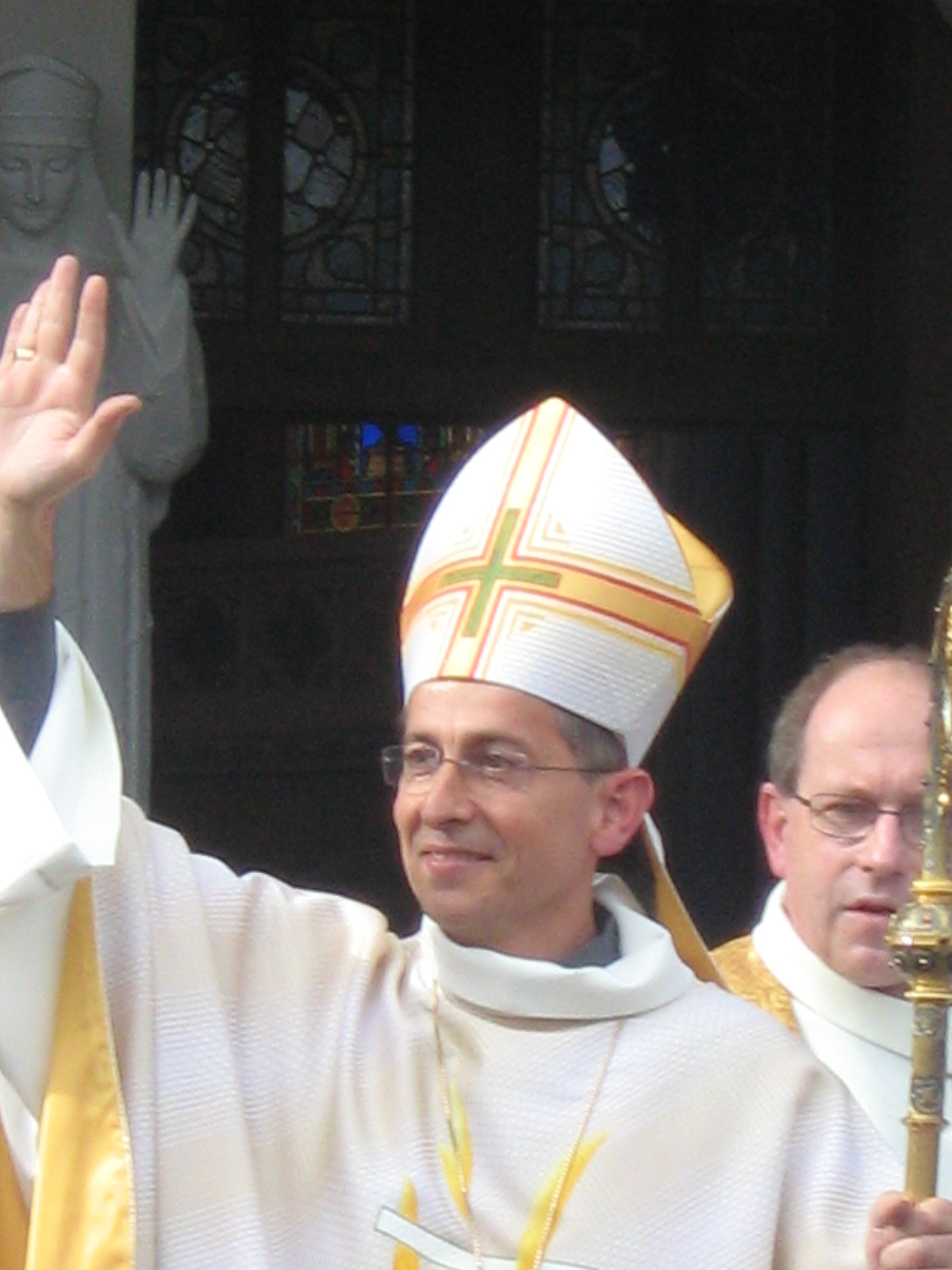 Mgr Thierry Scherrer, Evêque de Laval, le jour de son ordination épiscopale à Pontmain (53), le 6 juillet 2008.